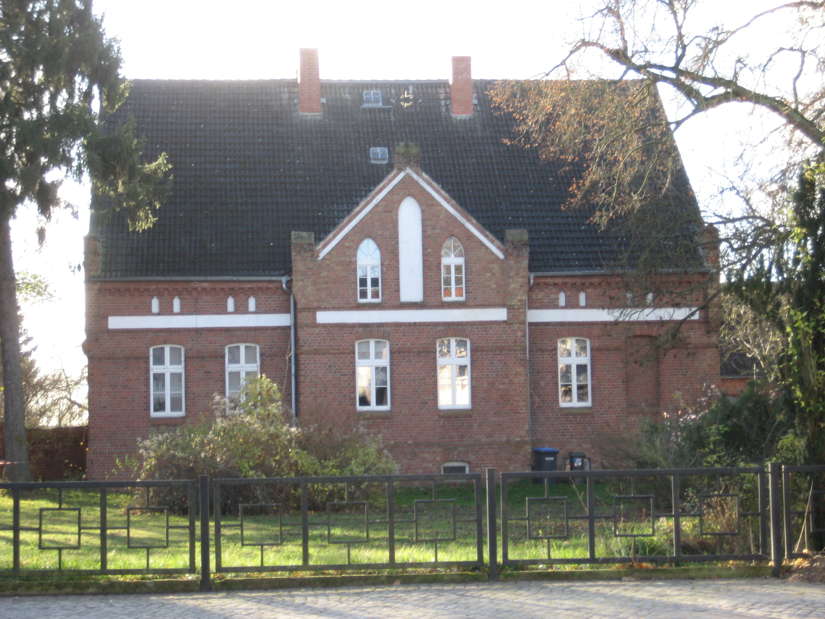 Dienstsitz des Evangelischen Pfarrers der Gemeinde Löcknitz in der Chausseestraße 99.